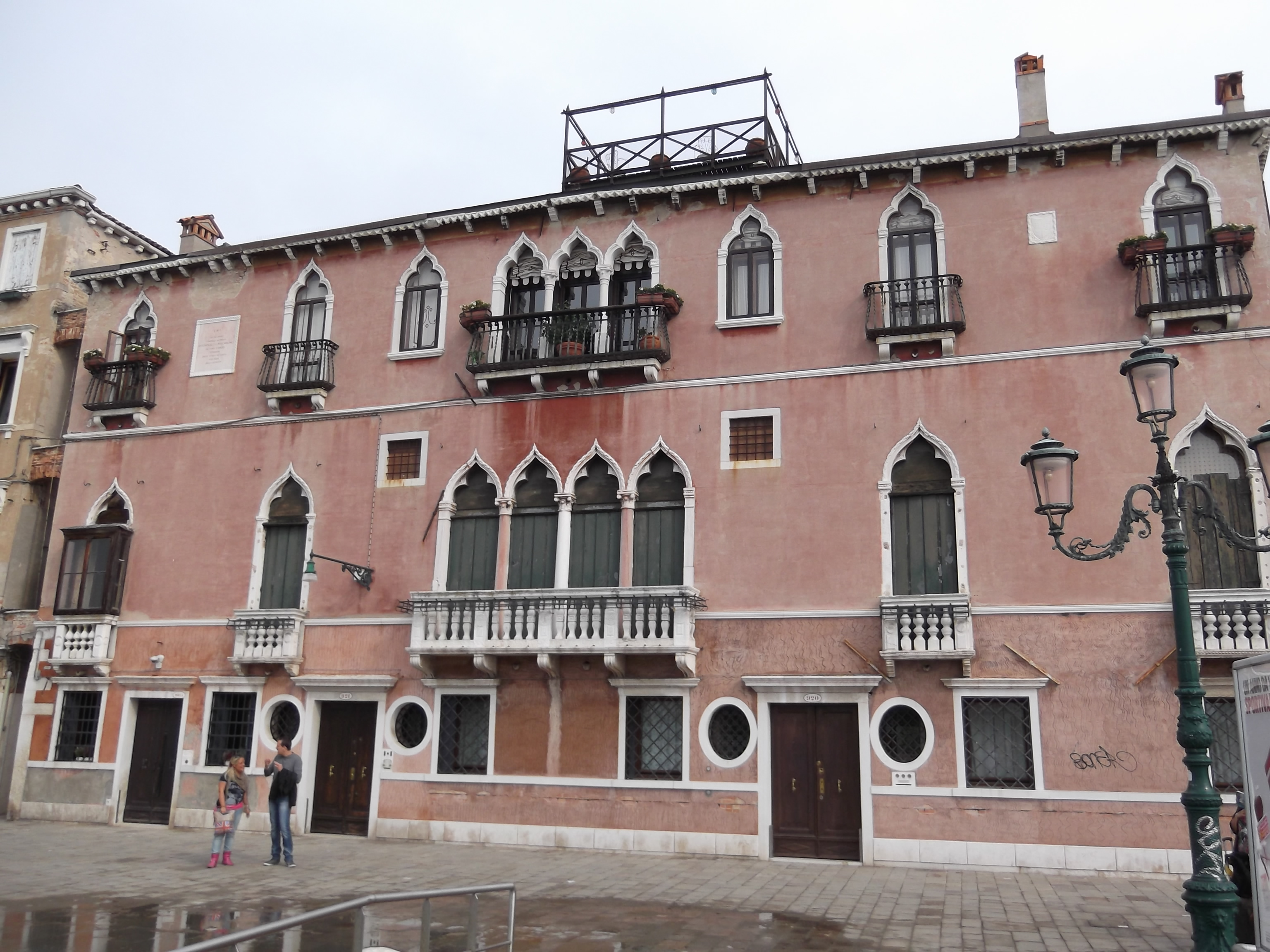 Dorsoduro, 30100 Venezia, Italy